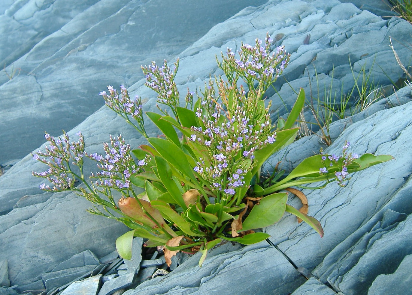 Photographie d'un Limonium carolinianum [syn. Limonium nashii], plante de la famille des Plumbaginaceae, prise à l'Île aux Basques.